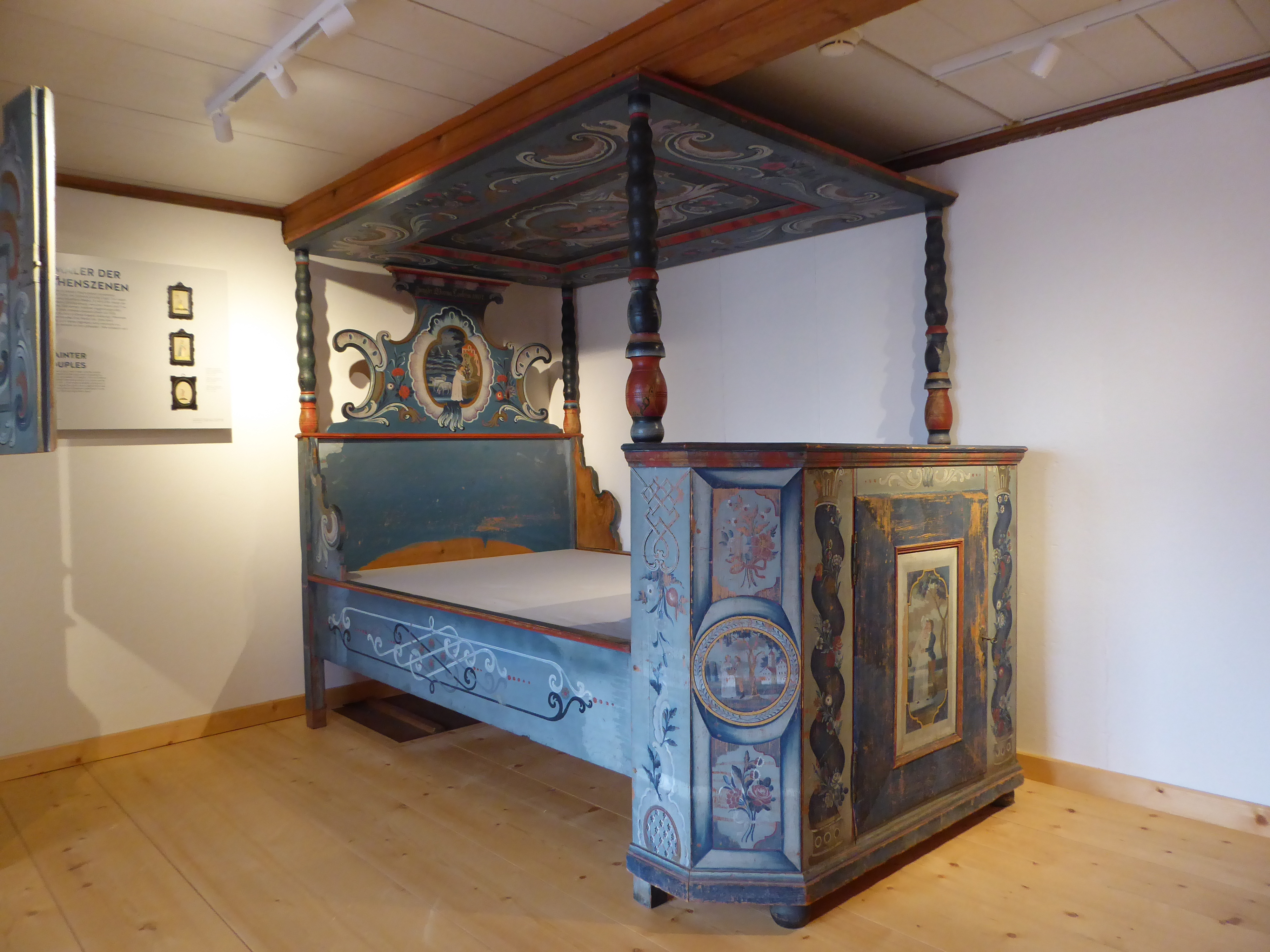 Himmelbett für «Jungfer Verena Looserin» vom «Maler der Pärchenszenen» (Zuschreibung), 1807